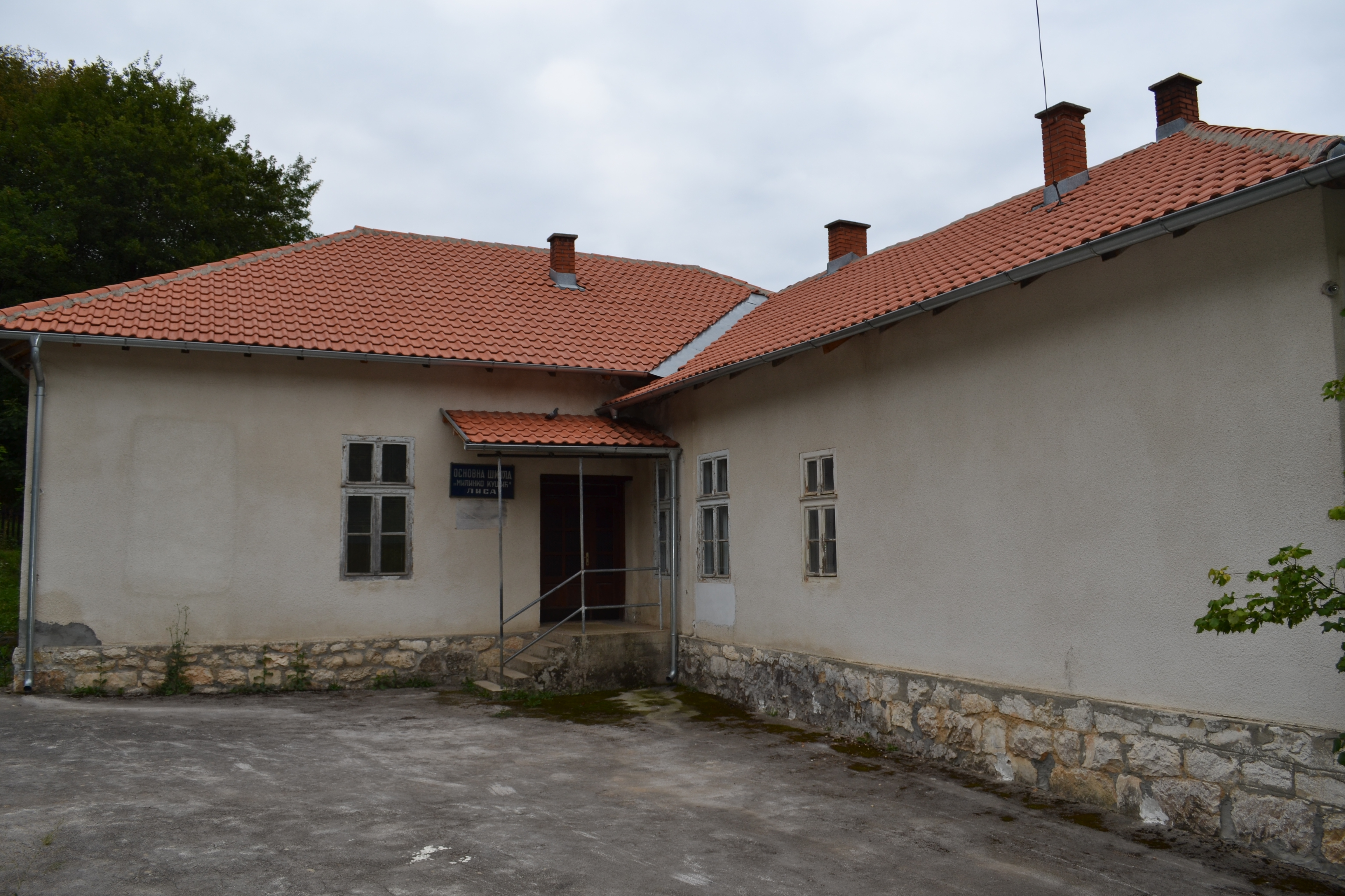 Škola u Lisi